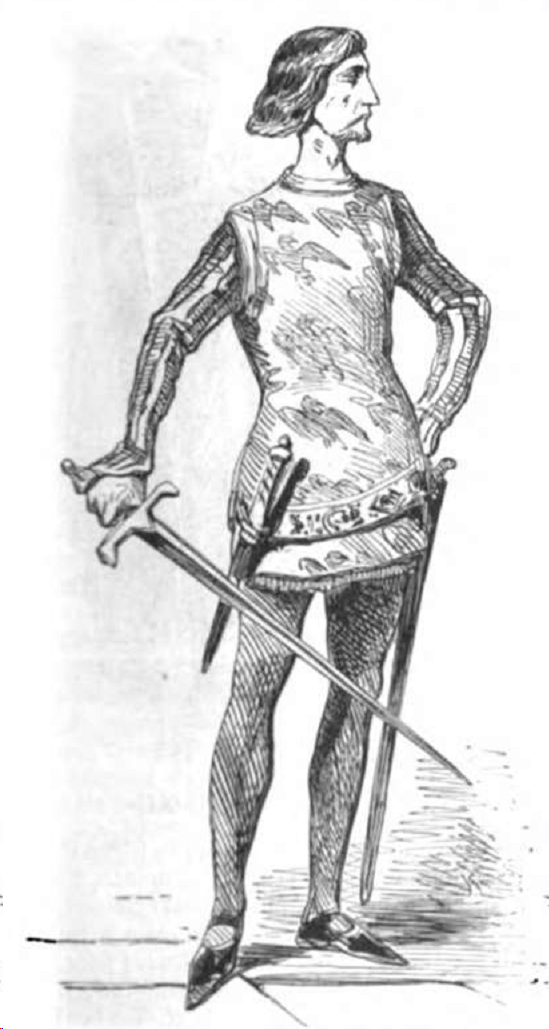 Geffroy in der Rolle des Otbert.